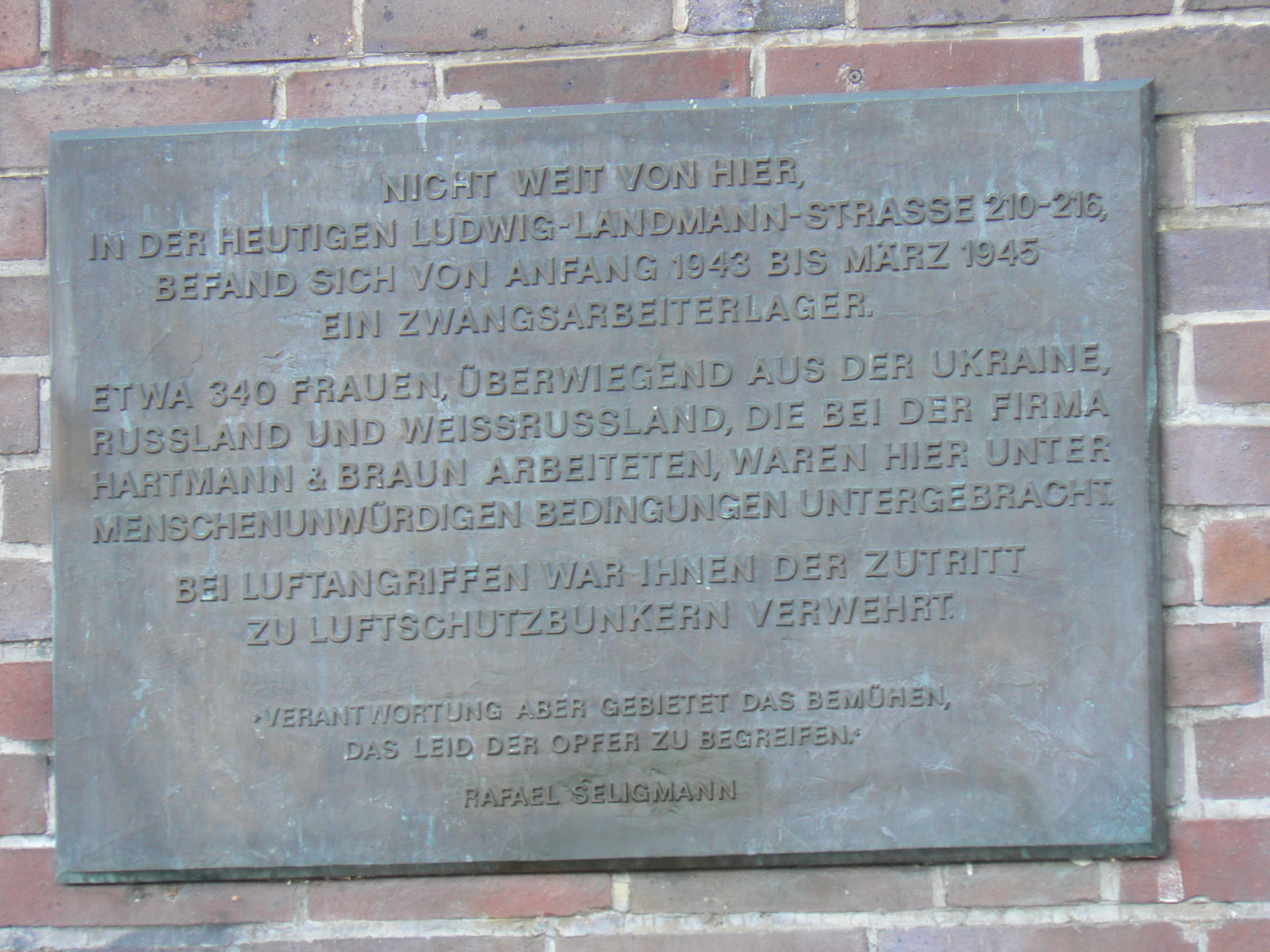 Gedenktafel an ein Zwangarbeitlager für ca. 340 Zwangsarbeiterinnen der Fa. Hartmann & Braun von 1943-45; Bronze, von Günter Maniewski (*1958); eingeweiht am 06.12.1995; Standort Frankfurt Bockenheim Hausen Ludwig-Landmann-Straße/Ecke Stephan Heise Straße